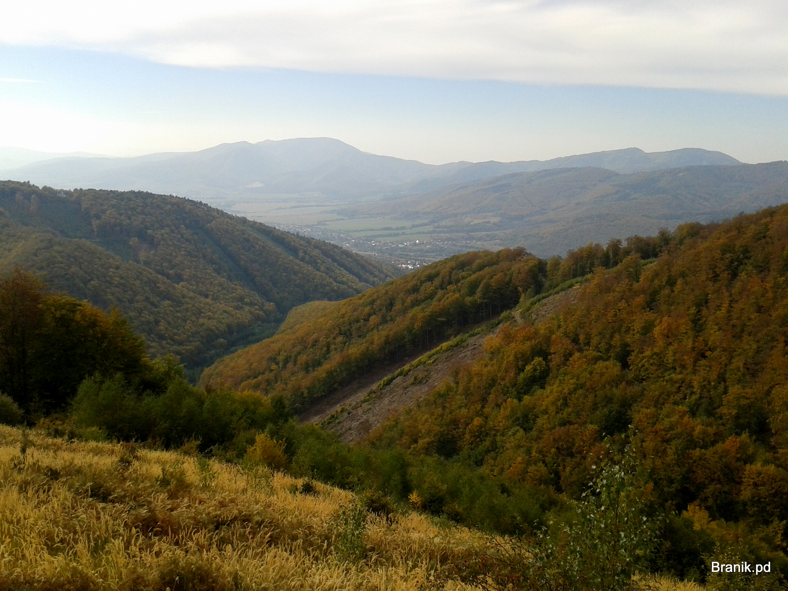 972 27 Nevidzany, Slovakia